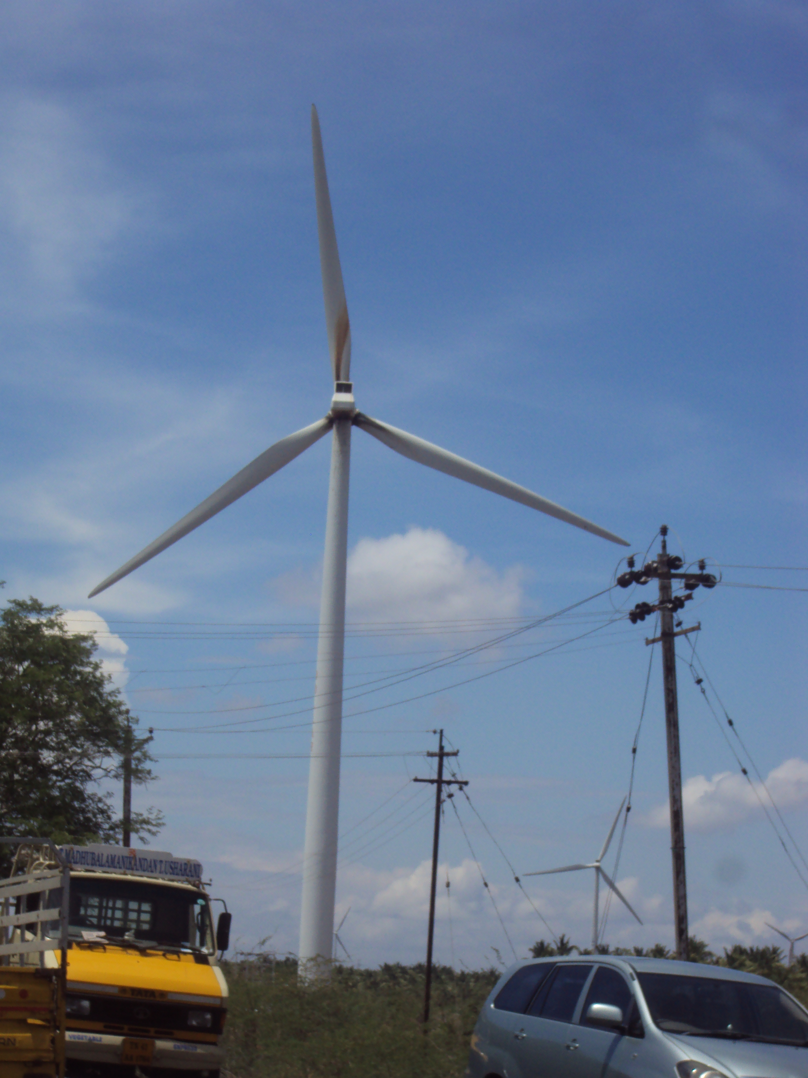 കാറ്റാടിയന്ത്രം